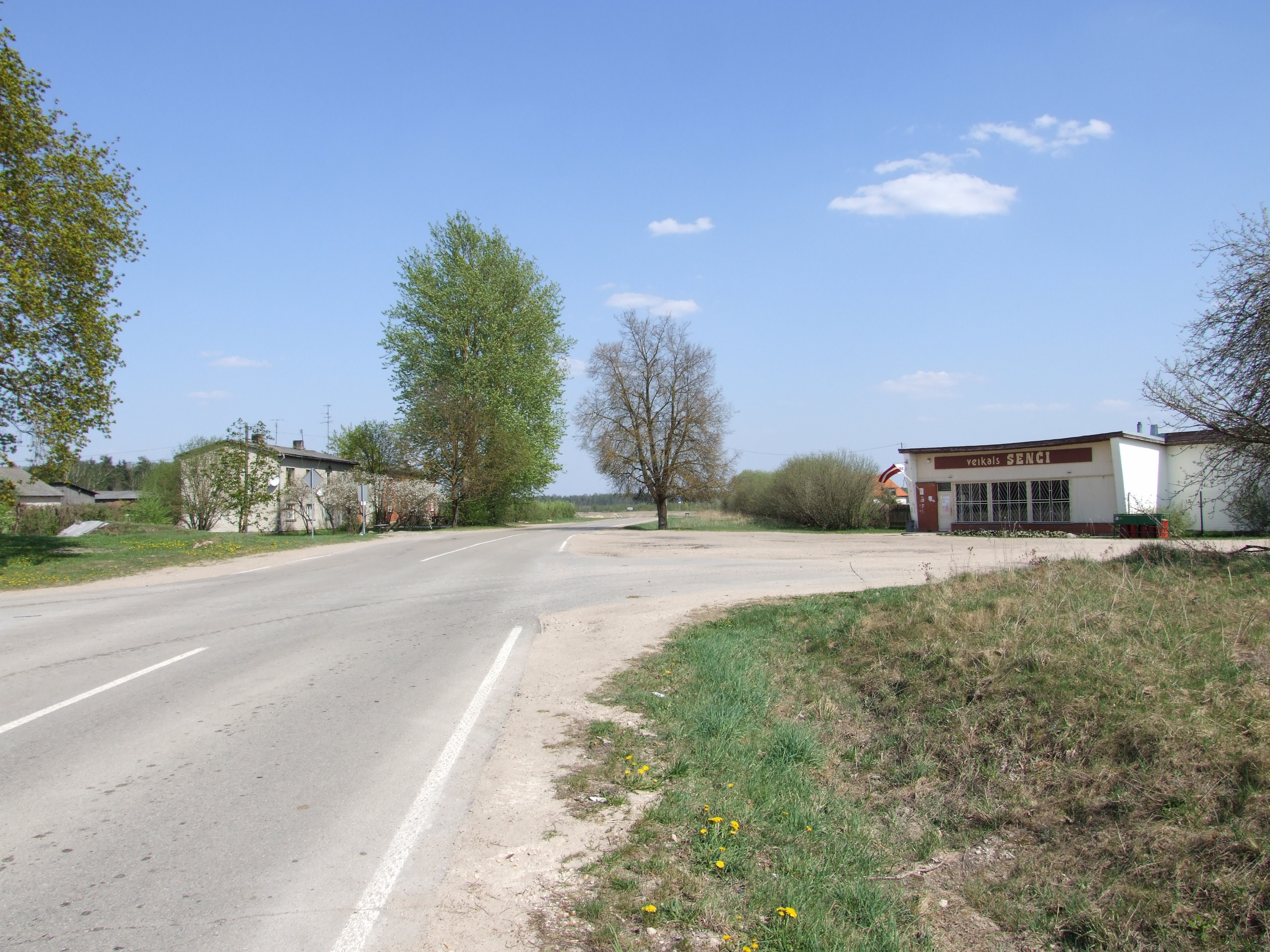 Vārpu centrālais krustojums